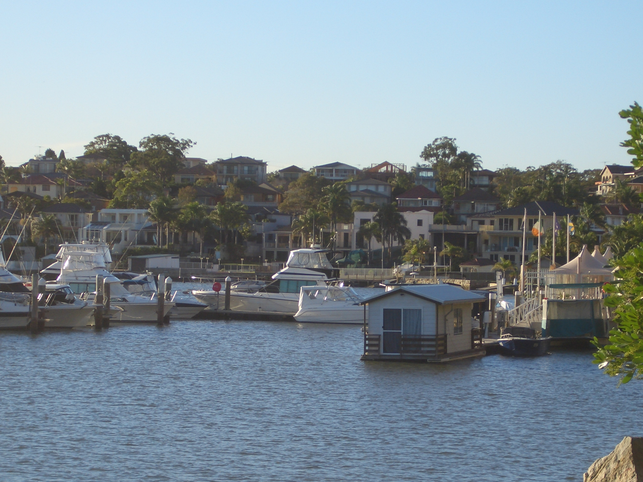 marina at Blakehurst